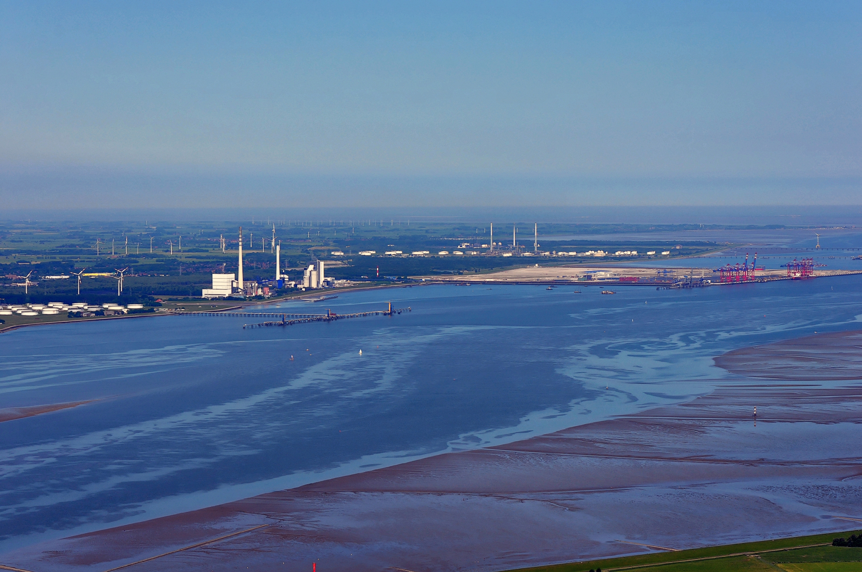 Luftbilder von der Nordseeküste 2012-05